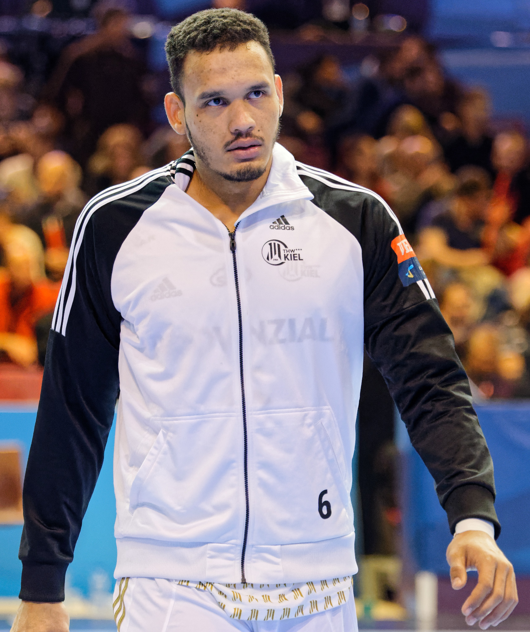 Rencontre de phase de groupe de ligue des champions 2015-16 entre le PSG et le THW Kiel. A la Halle Carpentier (Paris), le 22 novembre 2015.